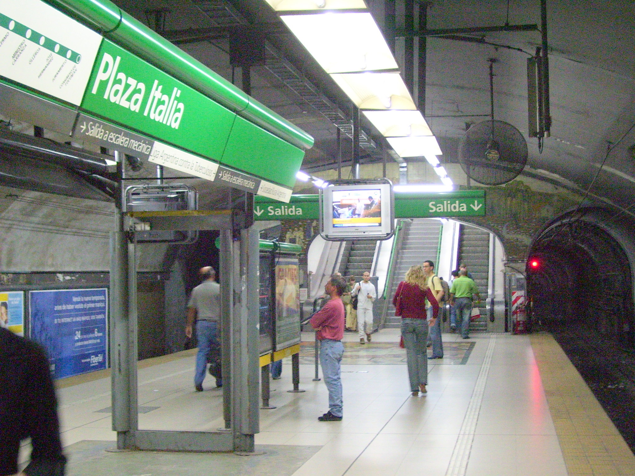 Estación Plaza italia. Buenos Aires, Argentina